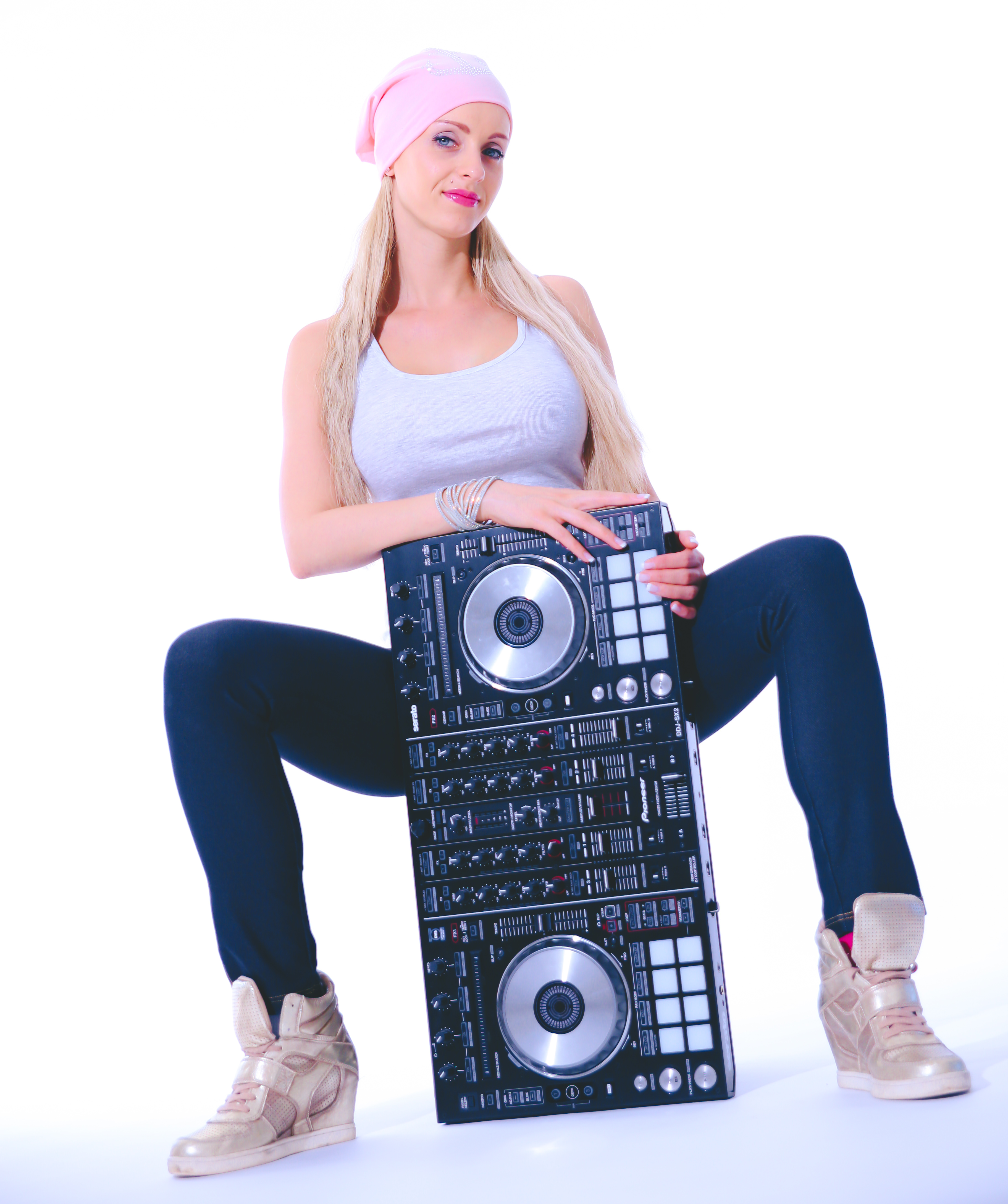 Anike mit Dj Mischpult im Fotostudio